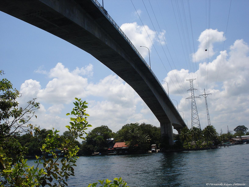 Puente Rio Dulce